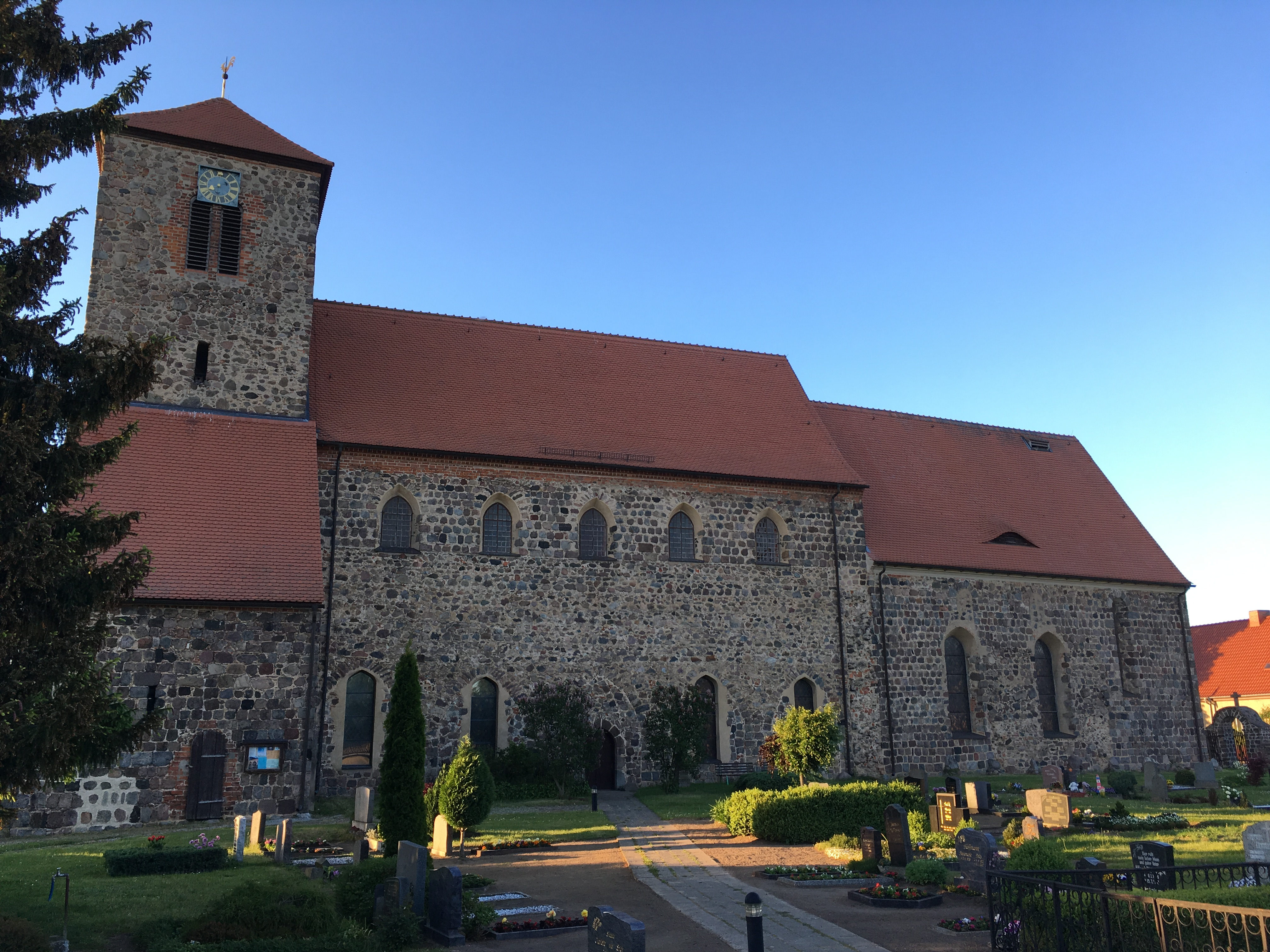 Die Dorfkirche Falkenhagen wurde in der ersten Hälfte des 14. Jahrhunderts als Basilika mit einem dreischiffigen Langhaus errichtet. 1801 trugen Handwerker die Seitenschiffe ab und schlossen die Arkadenbögen. Zur Ausstattung gehören unter anderem eine Kanzel aus dem Anfang des 18. Jahrhunderts sowie eine hölzerne Fünte aus der ersten Hälfte des 17. Jahrhunderts.